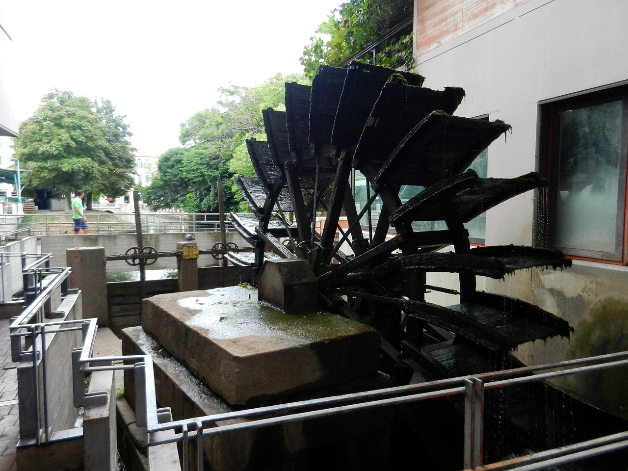 Treviso - Mulino presso l'Isola della Pescheria sul Canale Cagnan